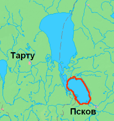 Место Псковского озера в Псковско-Чудском озёрном комплексе